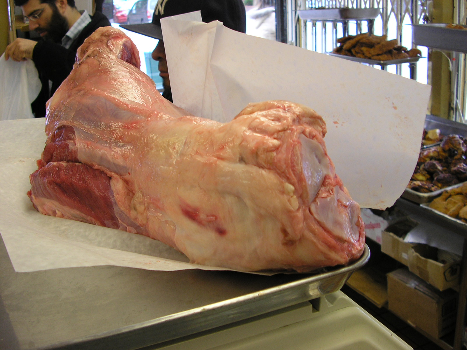 זורע של בהמה שנשחטה כדין -גלאטט